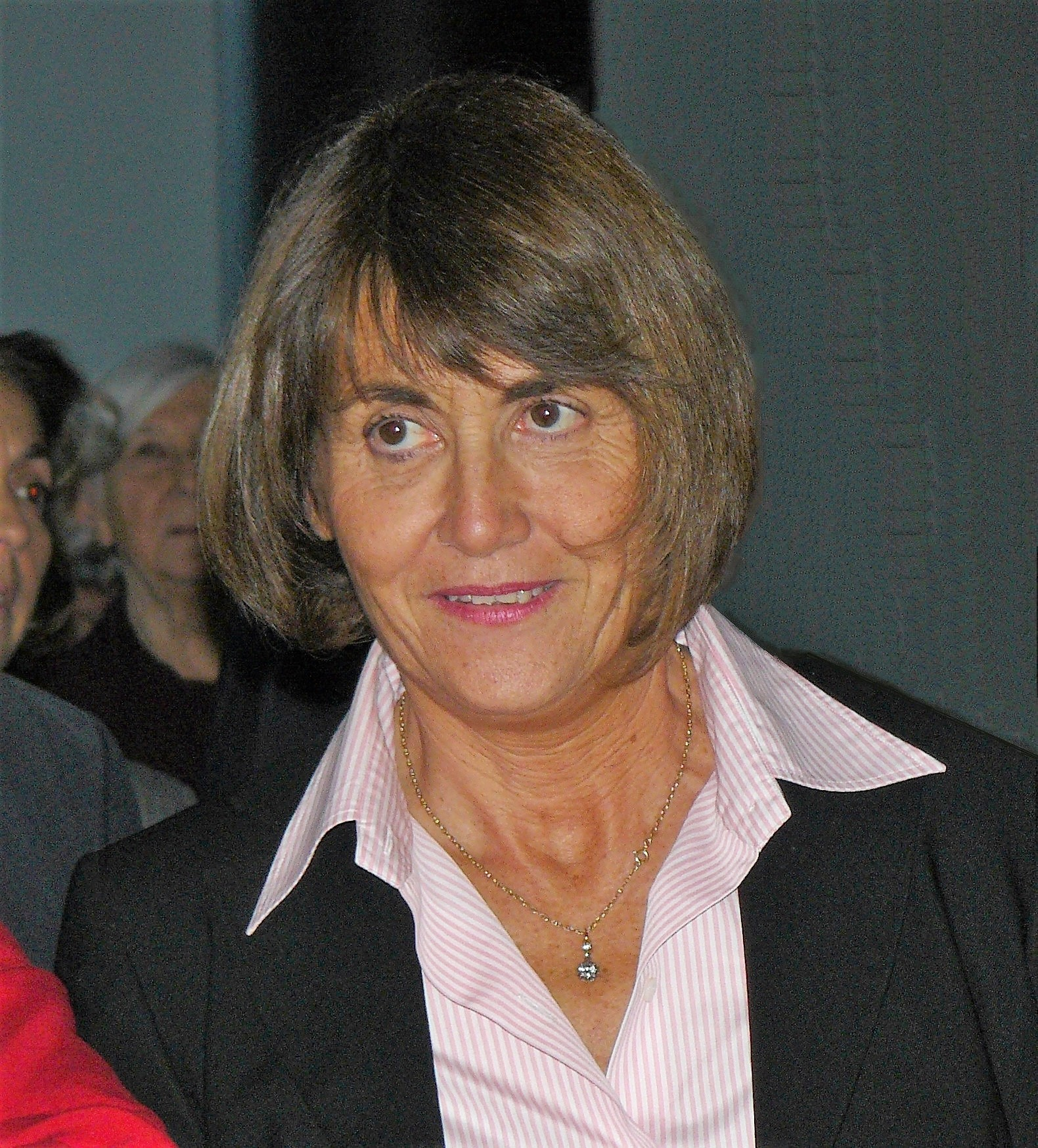 Christine Albanel, ministre de la Culture du gouvernement de François Fillon, lors d'une visite ua musée du Quai Branly, le 28 novembre 2008